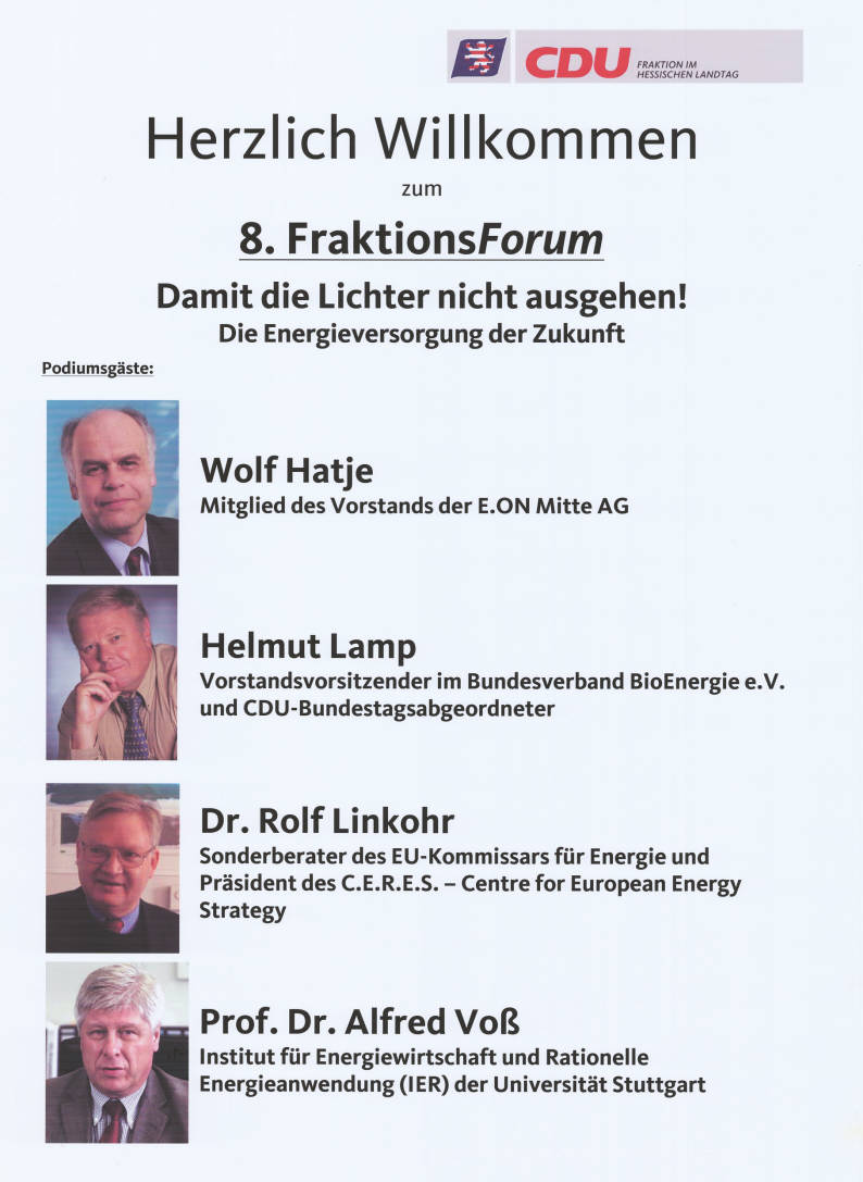 Herzlich Willkommen zum 8. FraktionsForum Damit die Lichter nicht ausgehen! Die Energieversorgung der Zukunft Podiumsgäste: Wolf Hatje Mitglied des Vorstands der E.ON Mitte AG Helmut Lamp Vorstandsvorsitzender im Bundesverband BioEnergie e.V. und CDU-MdB Dr. Rolf Linkohr Sonderberater des EU-Kommissars für Energie ... Prof. Dr. Alfred Voß Institut für Energiewirtschaft (...) der Universität Stuttgart Abbildung: Porträtfotos Plakatart: Ankündigungsplakat Auftraggeber: CDU Fraktion im Hessischen Landtag Objekt-Signatur: 10-031 : 78 Bestand: CDU-Plakate (10-031) GliederungBestand10-18: CDU-Plakate (10-031) » Parteitage, Parteikongresse Lizenz: KAS/ACDP 10-031 : 78 CC-BY-SA 3.0 DE